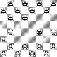 Обратный кол